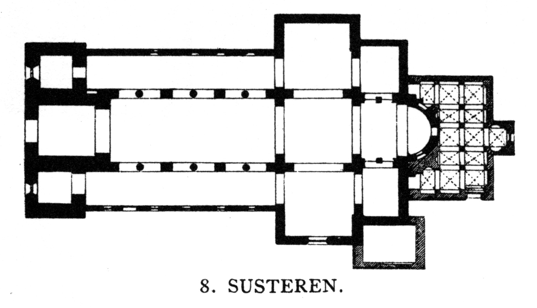 Susteren, S. Amalberga, floor plan.